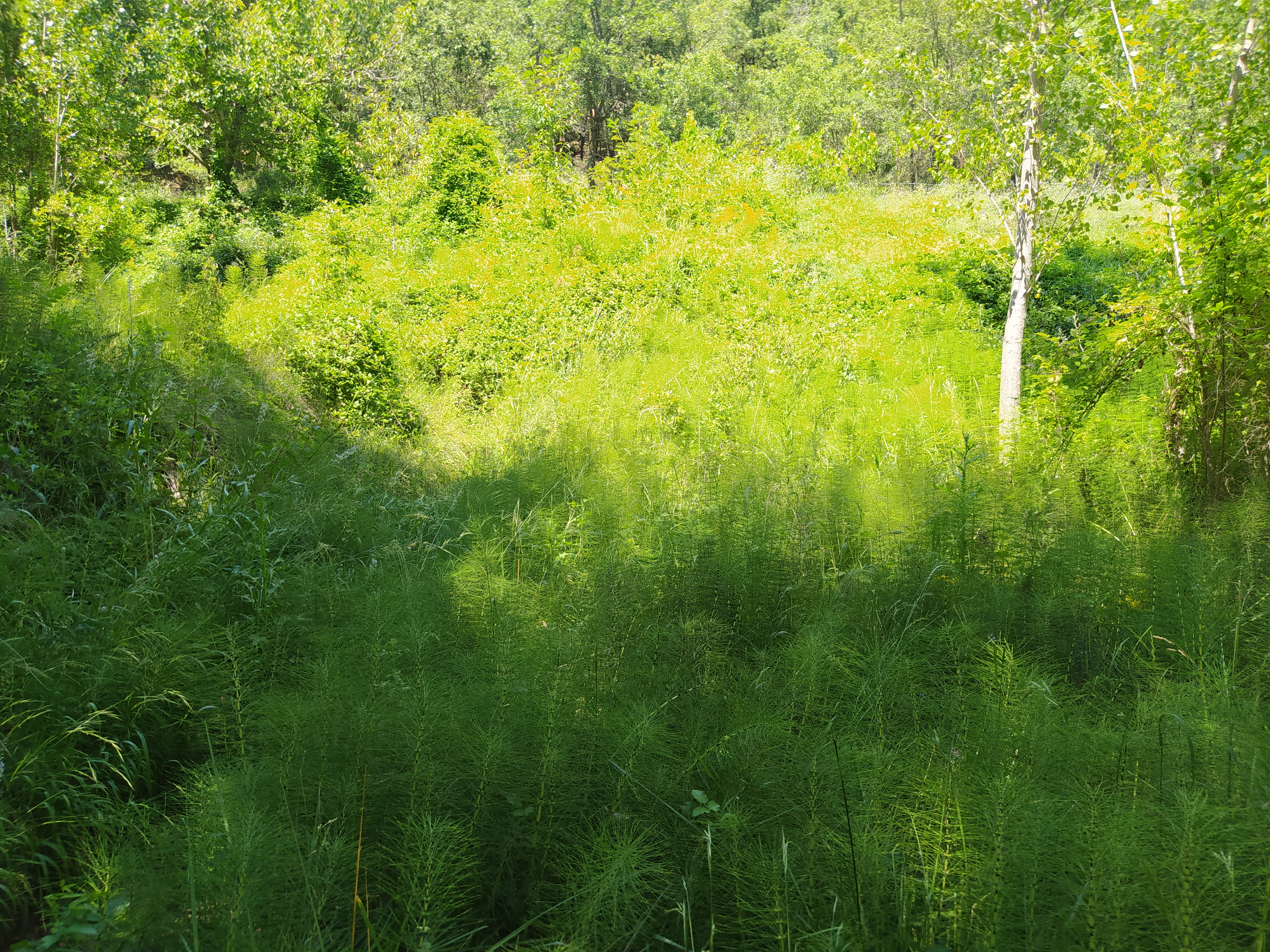 Vista general de la font de Fontelles, ubicada al terme municipal de Salàs de Pallars.